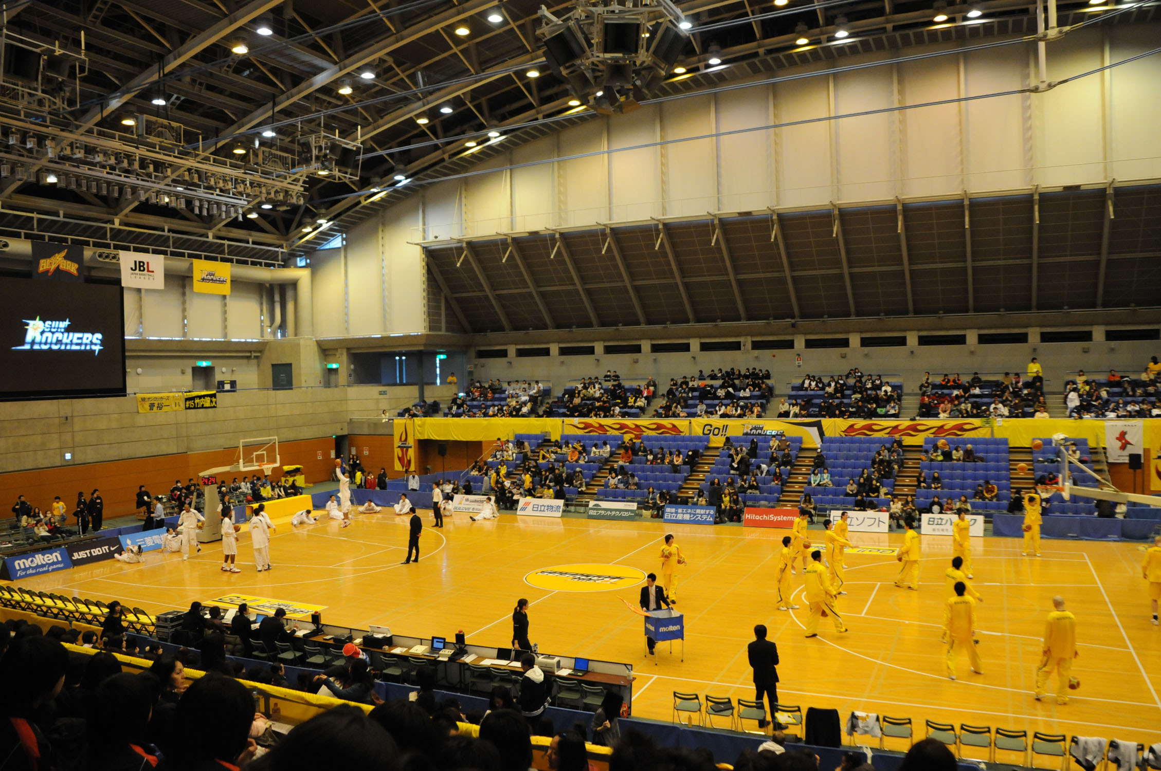 浦安市運動公園総合体育館、内部。